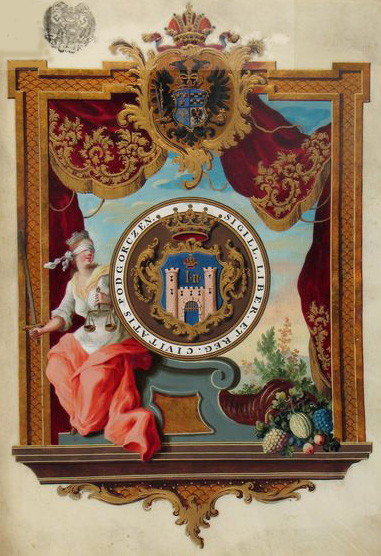 Stary herb Podgórza z nadania Józefa I 3 czerwca 1785, na pergaminie, oryginał w zbiorach APKr